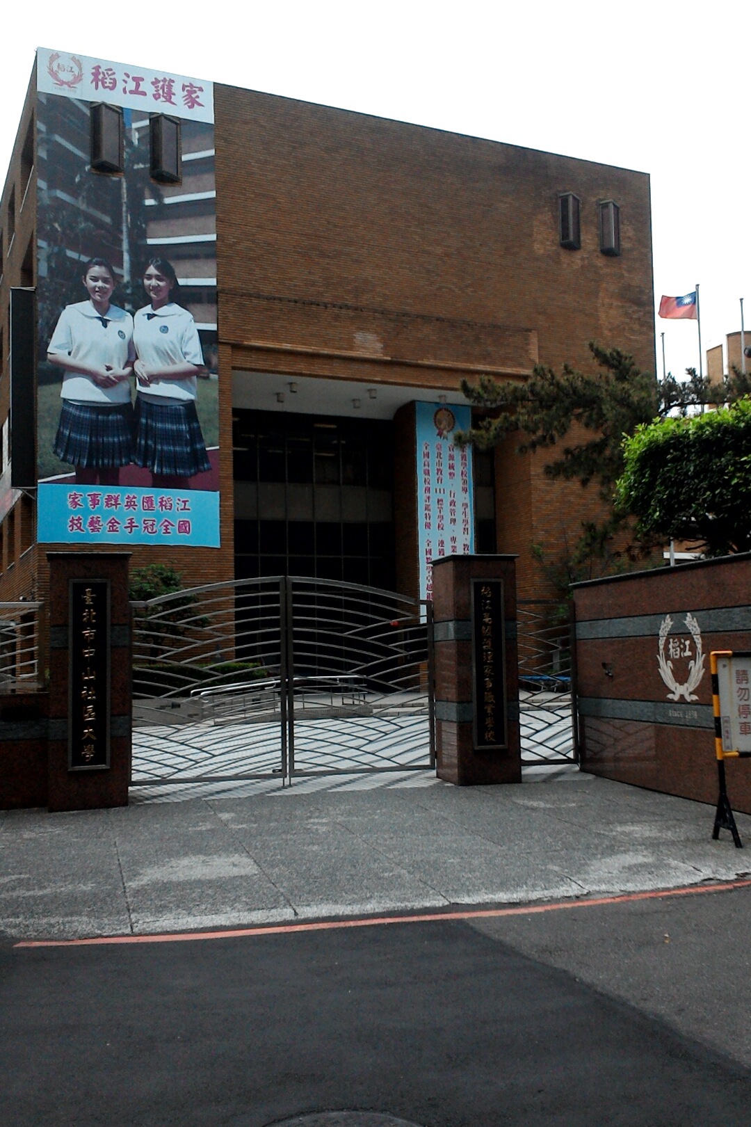 台北市私立稻江高級護理家事職業學校,台北市中山區新庄次分區新庄里